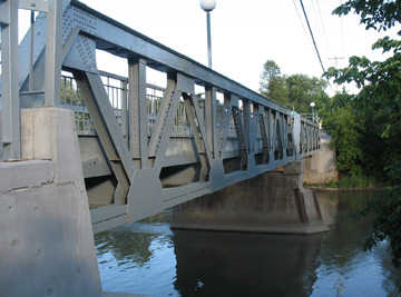 Pont Scott, Rivière Saint-Charles dans le quartier Saint-Sauveur à Québec, (Québec), Canada.